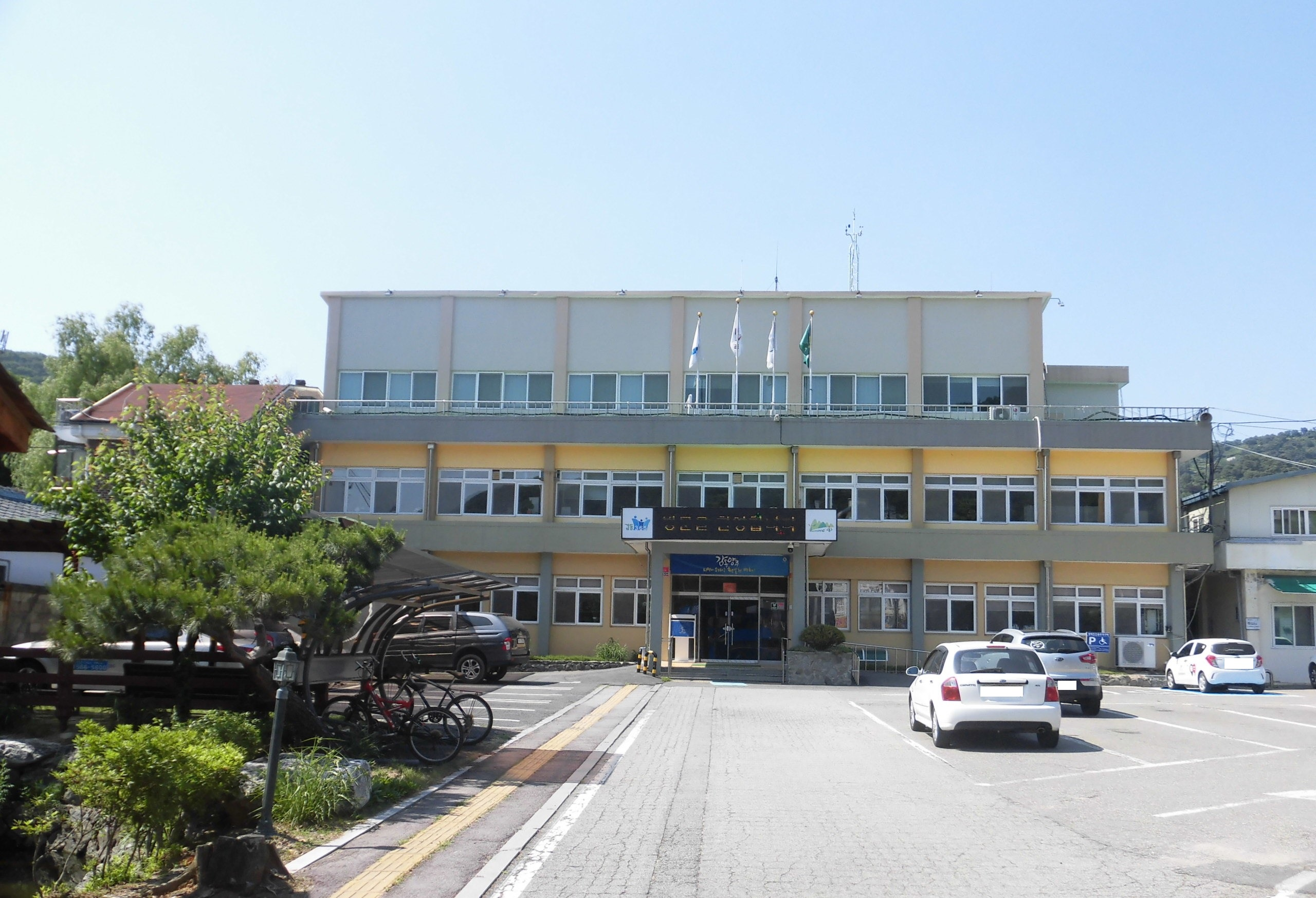 경기도 양주시에 있는 장흥면 사무소